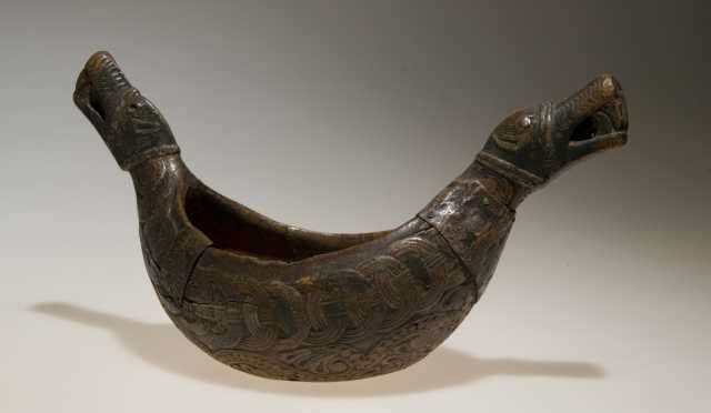 Kane fra middelalderen, radiologisk datering til perioden 1290 - 1380. Lengde 44 cm. Norsk Folkemuseum, NF.1906-0278.